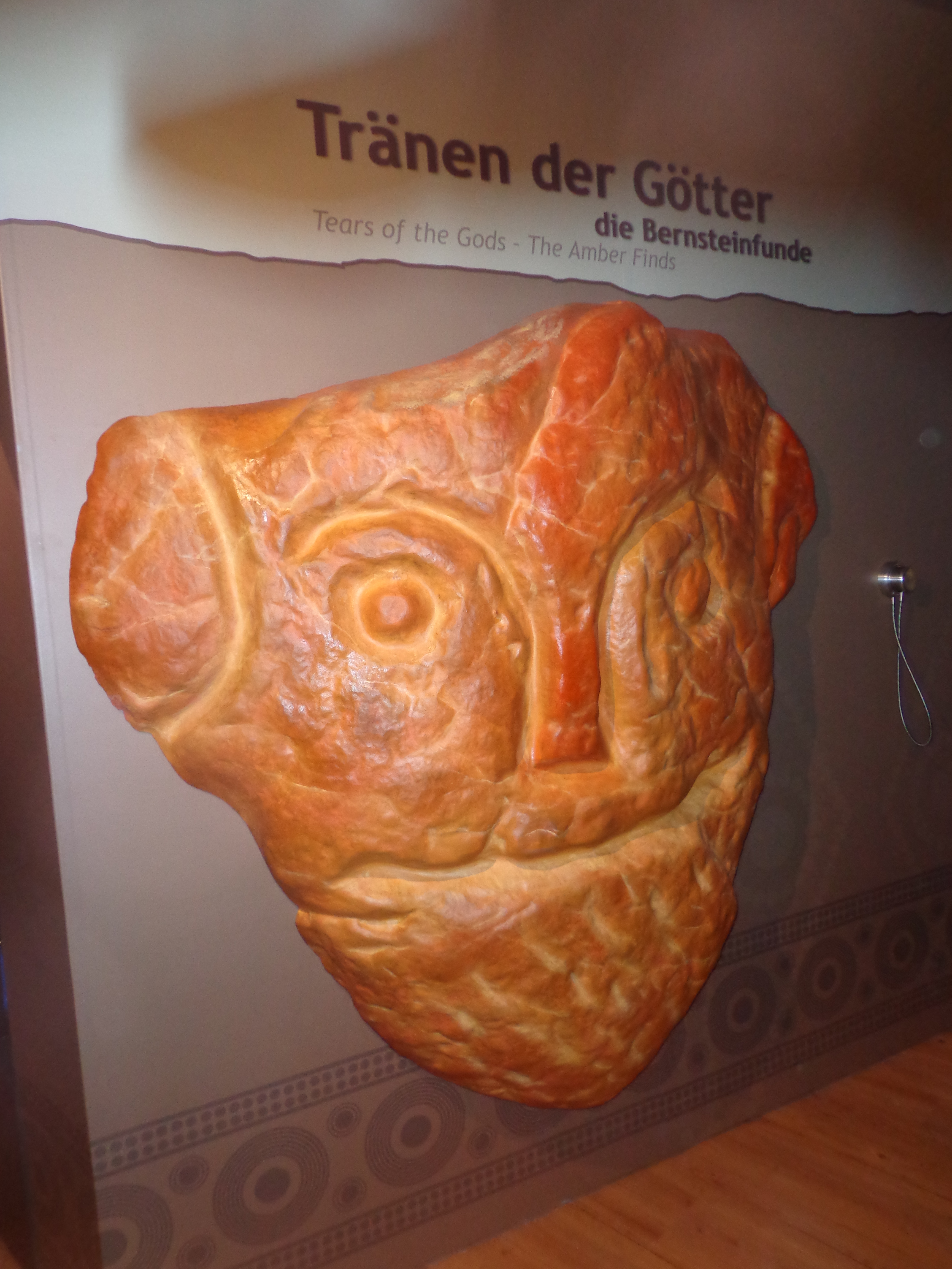 Dieses Bernsteingesicht ist zum Logo des Museums geworden